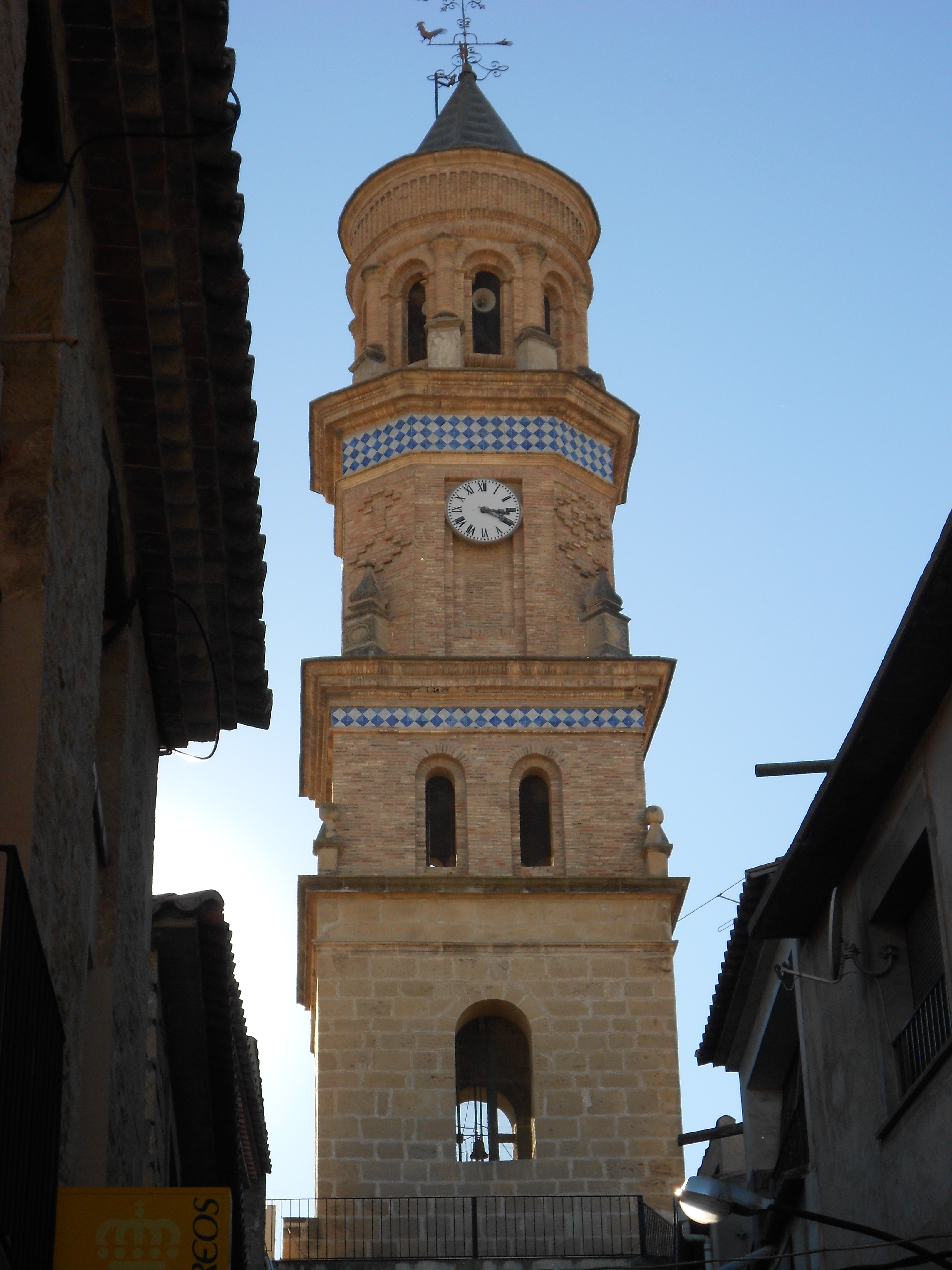 Torre del Reloj (Maella, Zaragoza)